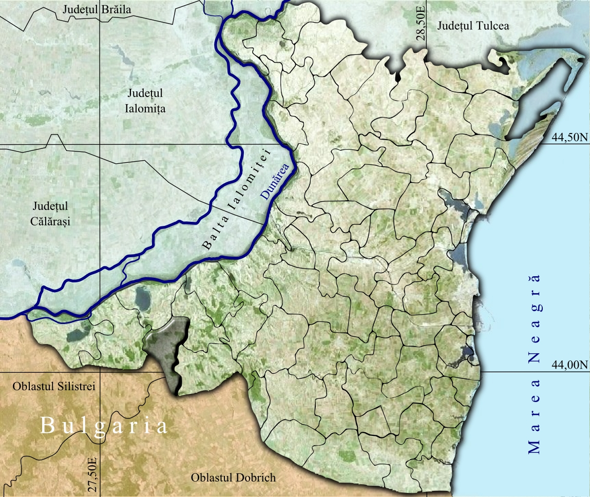 Baneasa jud Constanta.jpg